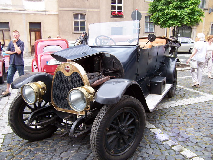 PKW Phänomen Typ 10/30 (Baujahr 1916) beim 20. Oldtimertreffen in Großschönau/Sachsen